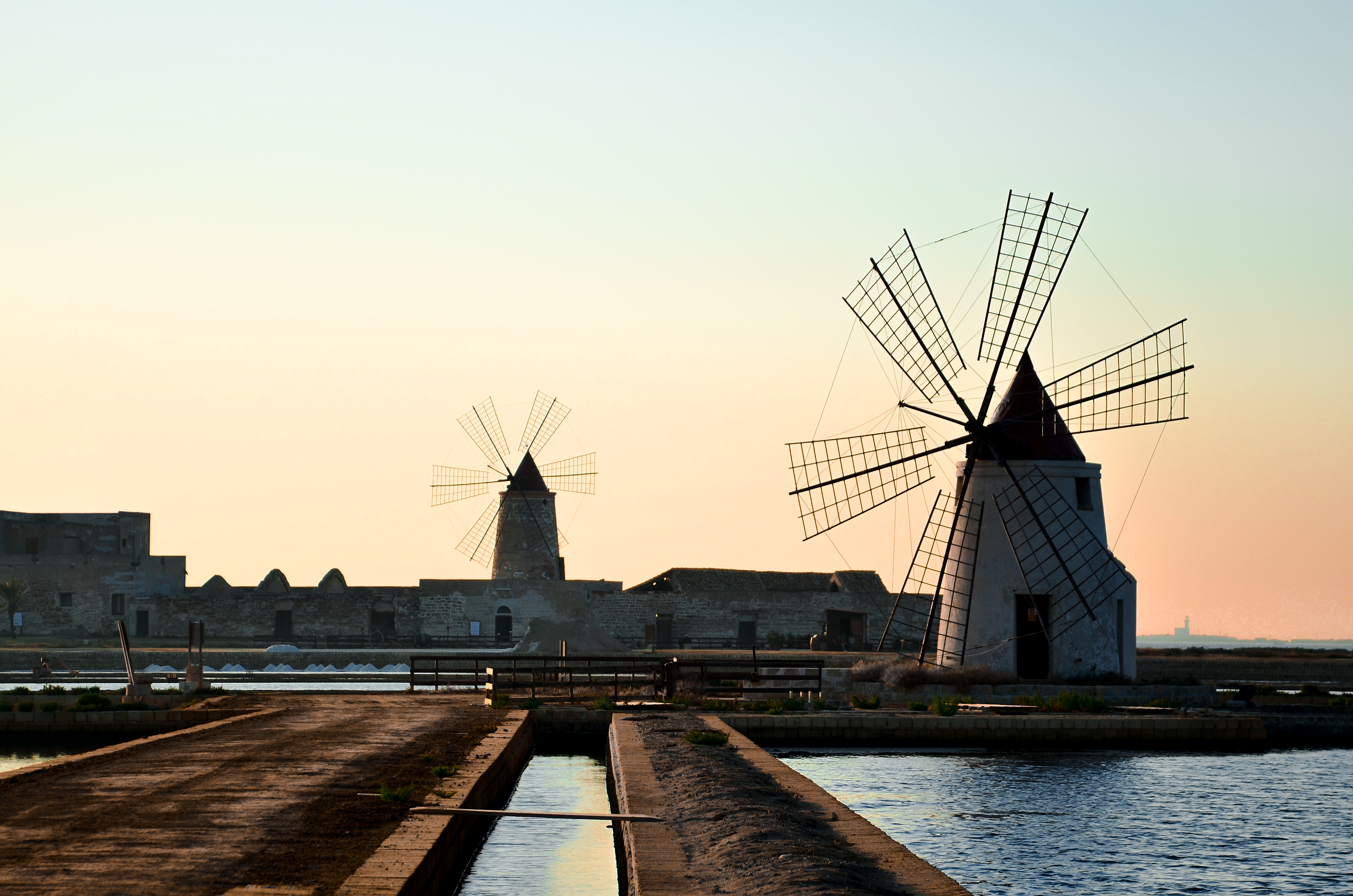 Saline di Trapani e Paceco - Riserva Naturale Regionale This is a photo of a monument which is part of cultural heritage of Italy. The authorisation for taking photos of this object was provided by the World Wide Fund for Nature Italy.